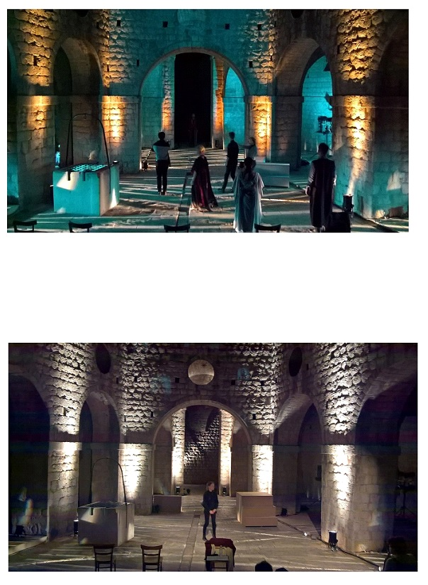 obje fotografije su u boji